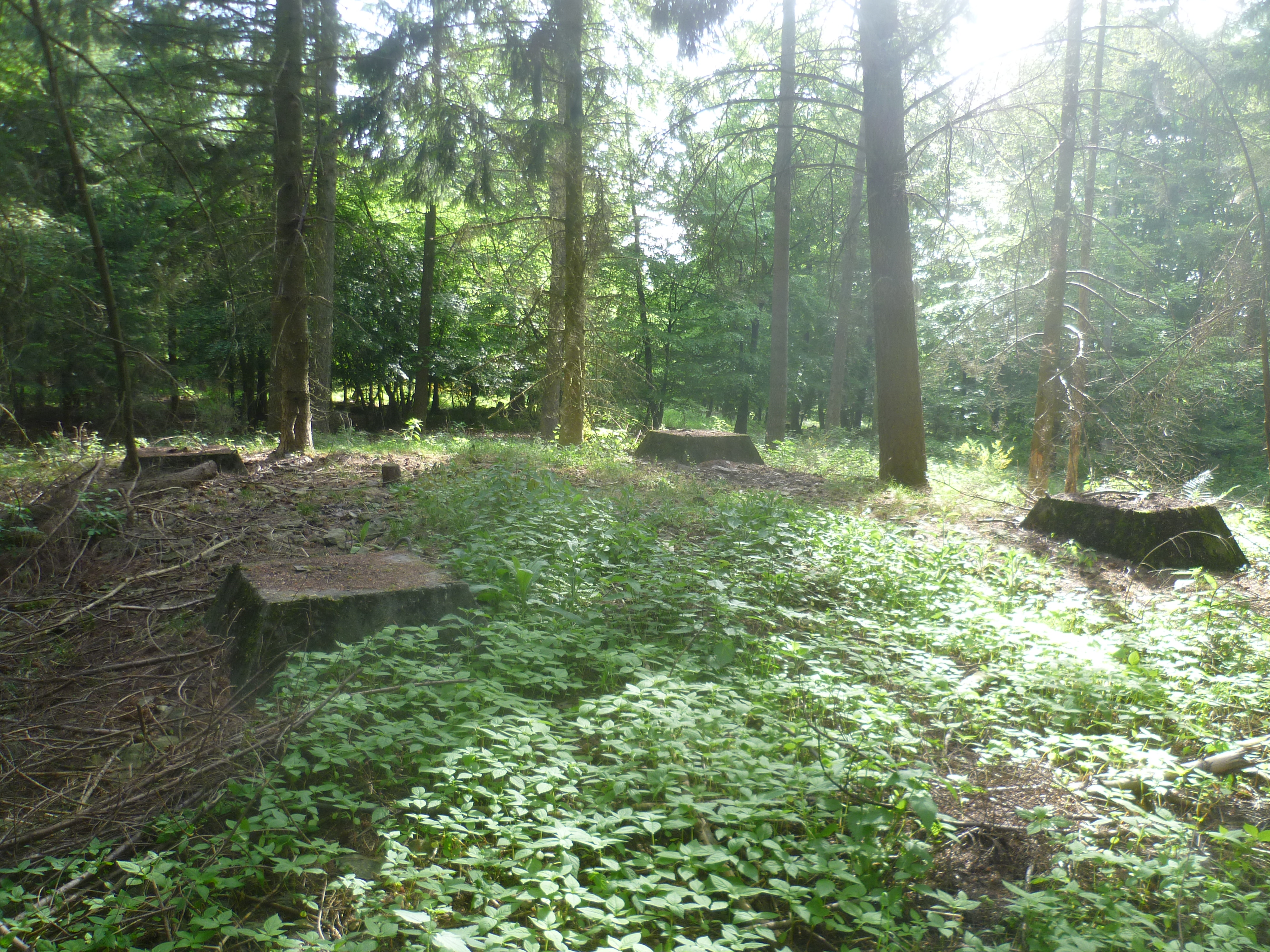 Der Ringwall Kuhardt bei Kransberg - Fundamente des Flakscheinwerfers